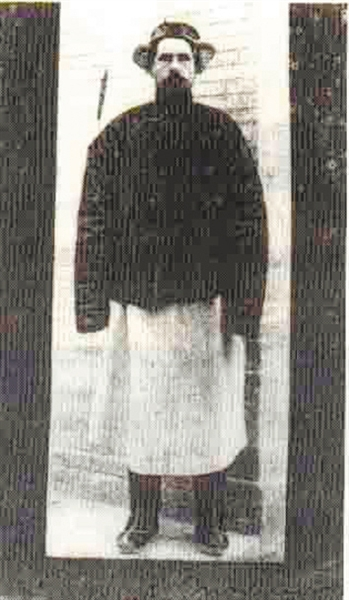 Antoine Mostaert (田清波) missionnaire catholique scheutiste, lorsqu'il était à Ordos vers 1910.